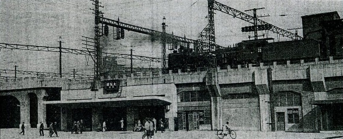 1944年の大阪駅北口。